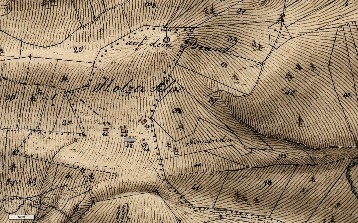 Holzeralm am Tegernsee: Historische Flurkarte